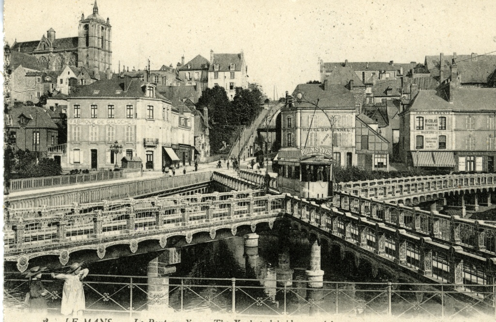 Pont en X du Mans, Sarthe, France